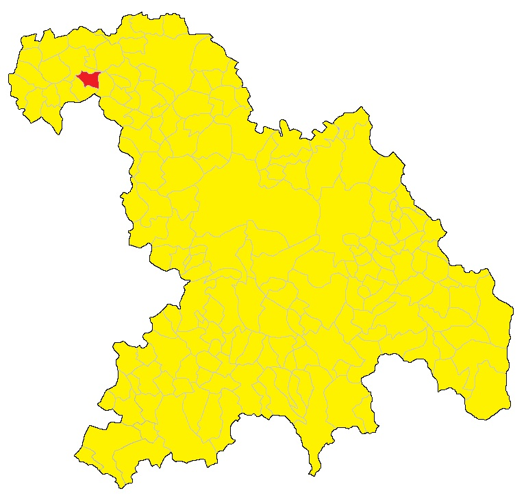 Mappa del comune di Serralunga di Crea (AL)